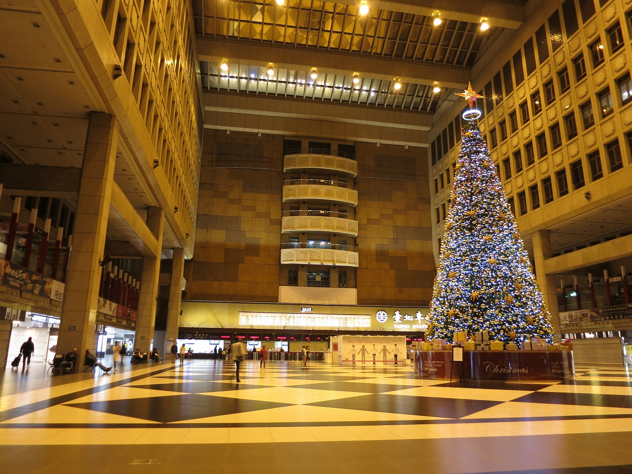 臺北車站一樓大廳的聖誕樹。